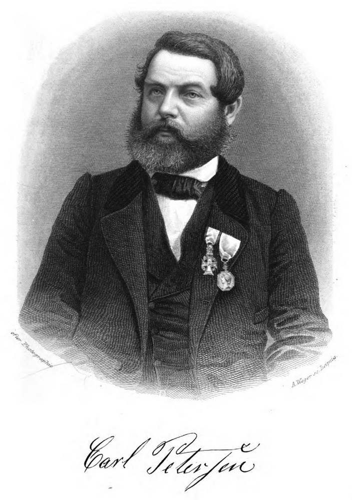 Carl Petersen (1830-1880) gestochen von August Weger